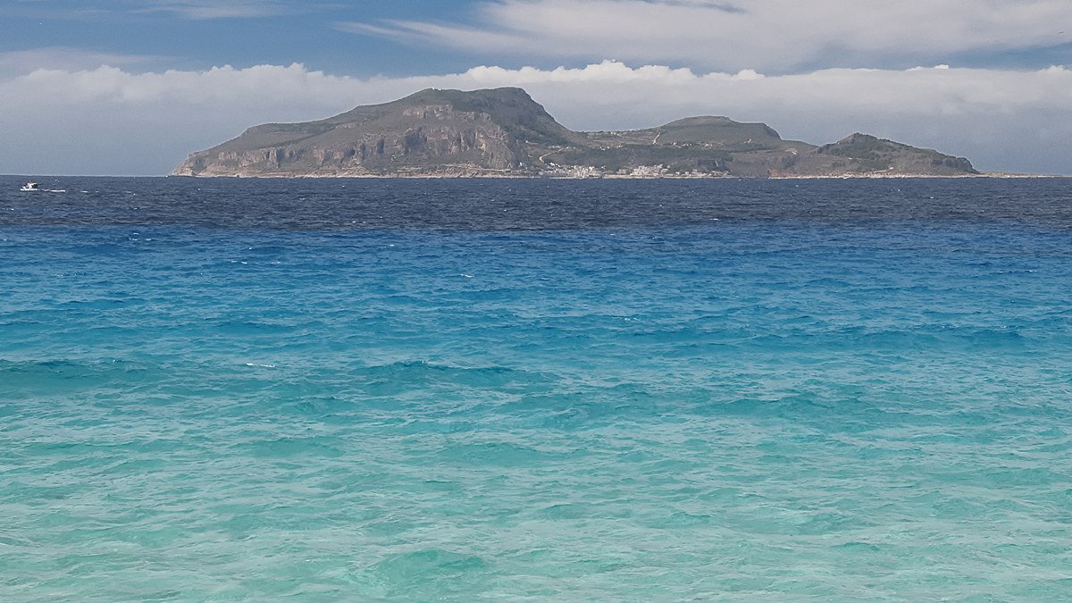 levanzo, isole egadi sicily